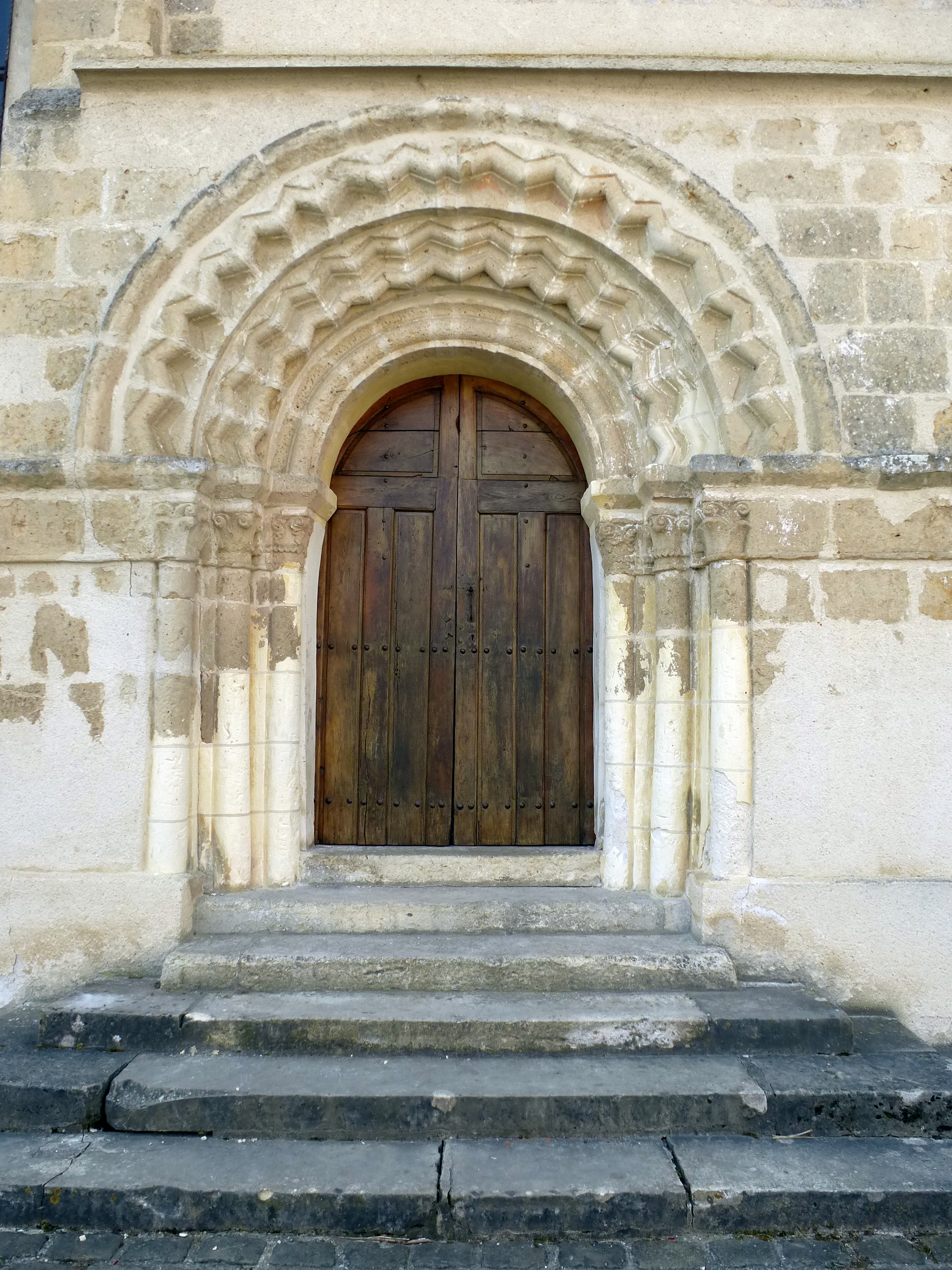 Portail de l'église Saint-Pons de Citry. (Seine-et-Marne, région Île-de-France).